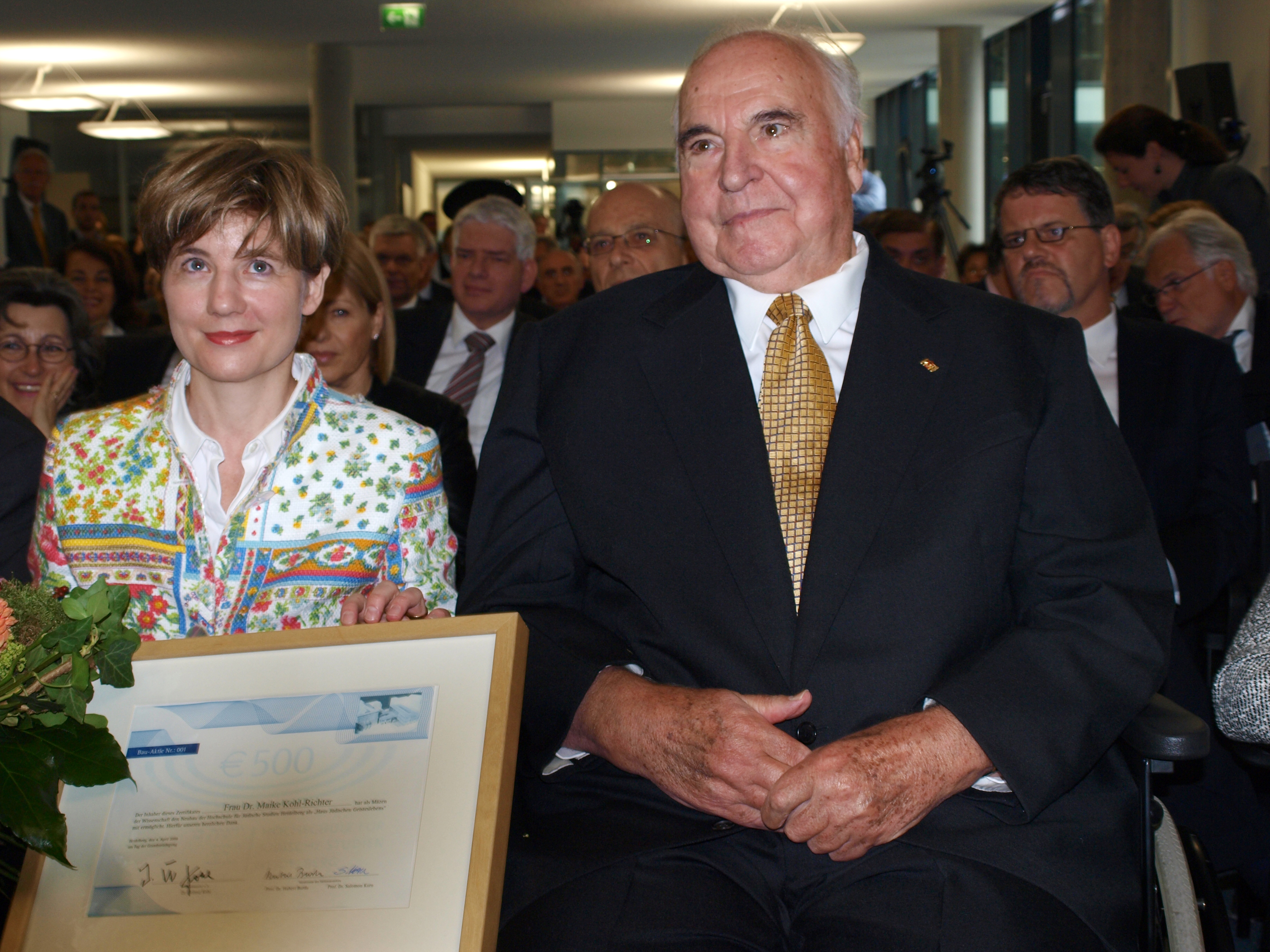 Helmut Kohl und Maike Richter-Kohl im Institut für Jüdische Studien in Heidelberg am 30. September 2009